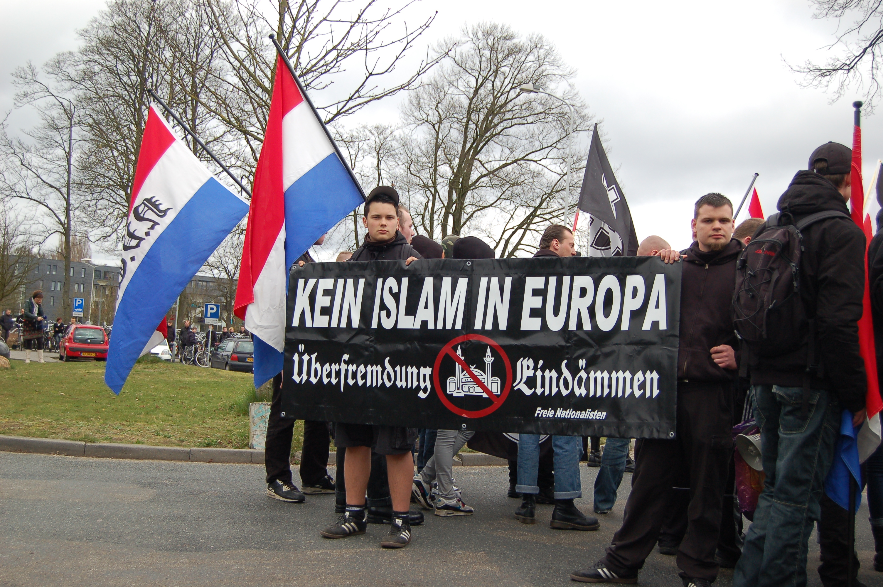 NVU demonstratie in Ede.